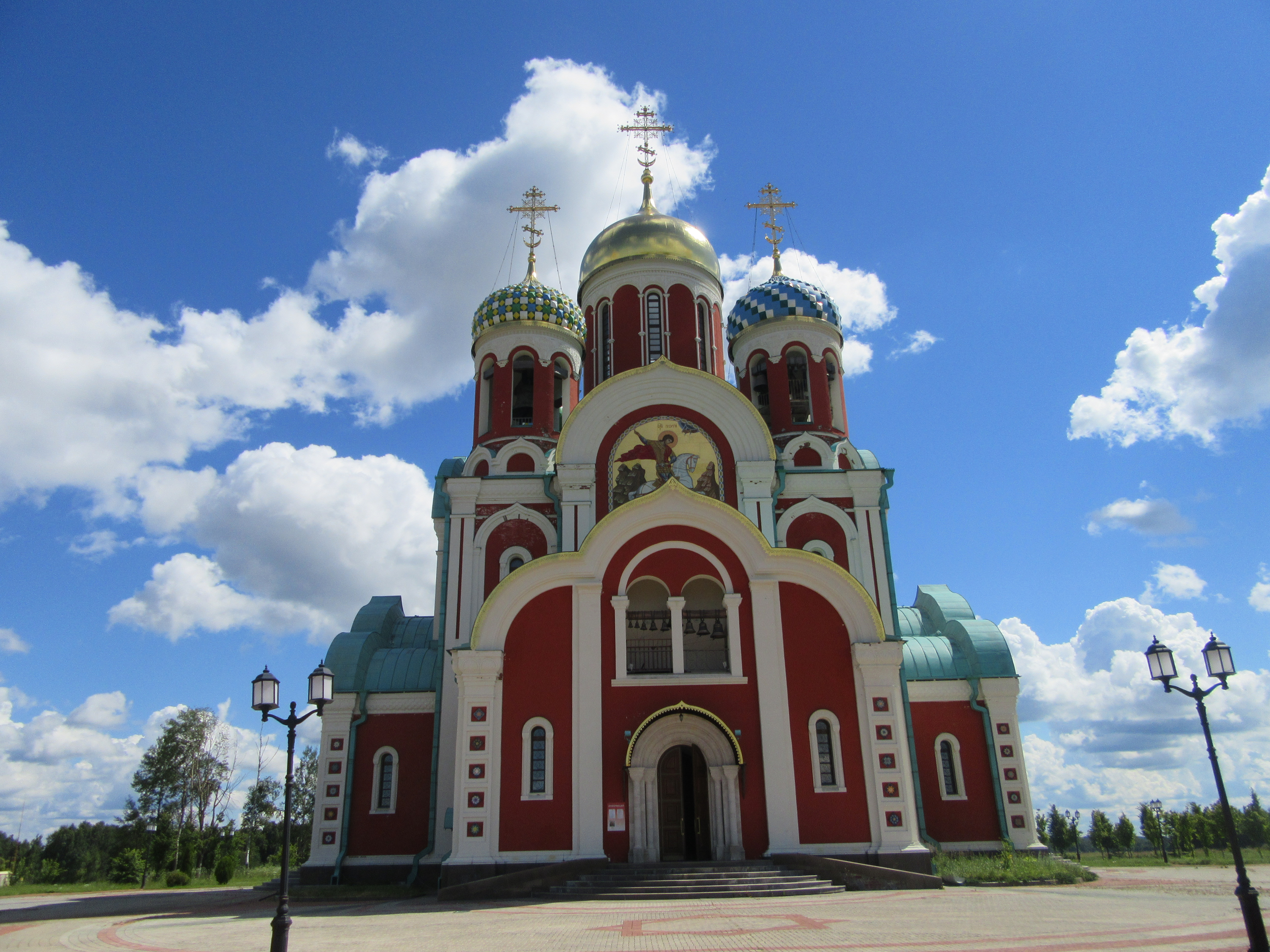 Храм Георгия Победоносца в Романово